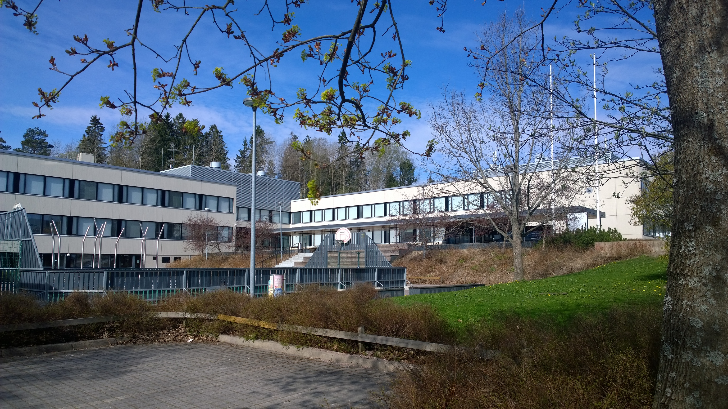 Kauklahden koulu asemata päin tultaessa tulosuunnassa, toukokuu 2020. Vasemmalla luokkasiipi, oikealla päärakennus.